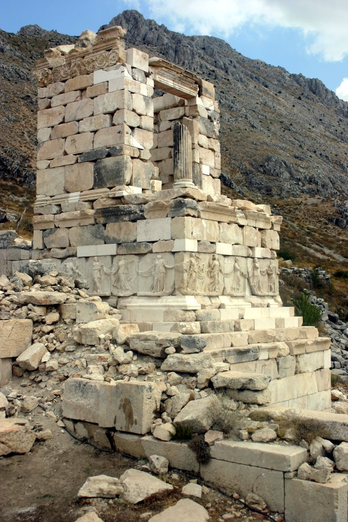 Sagalassos - NW Heroon (Tijl Vereenooghe, August 2005)